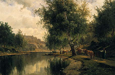 Painting by Edvard Bergh (1828-1880). Kategori:Målningar